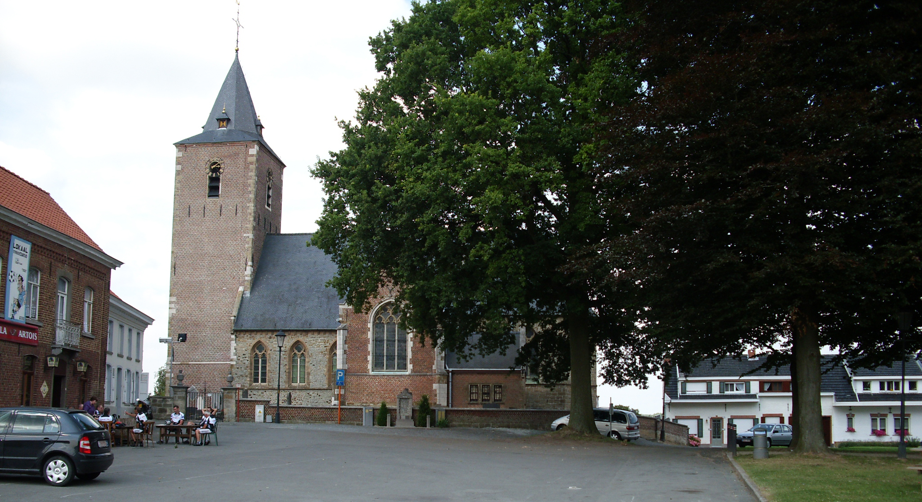 Sint Jan-Baptistkerk te Hemelveerdegem - Lierde - Oost-Vlaanderen - Vlaanderen - België